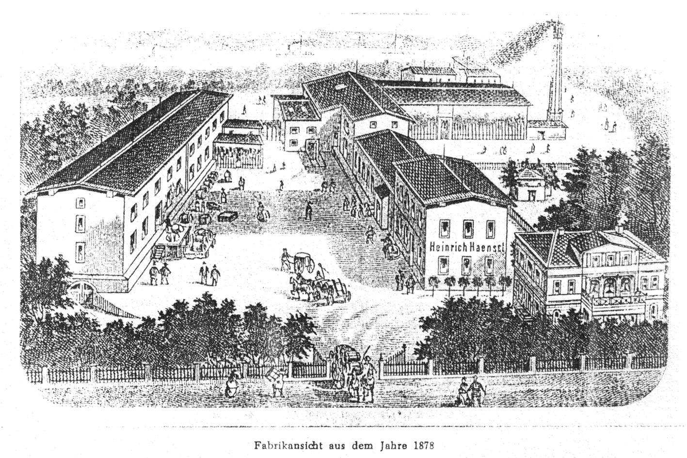 Pirna: Blick auf die 1867 von Gustav Haensel an der Clara-Zetkin-Straße (damals Waisenhausstraße) errichtete neue chemische Fabrik für ätherische Öle und Essenzen, von den damals sichtbaren Gebäuden blieb bis heute (Stand 2014) nur die Villa an der Straße (Vordergrund rechts) erhalten, Ansicht um 1878